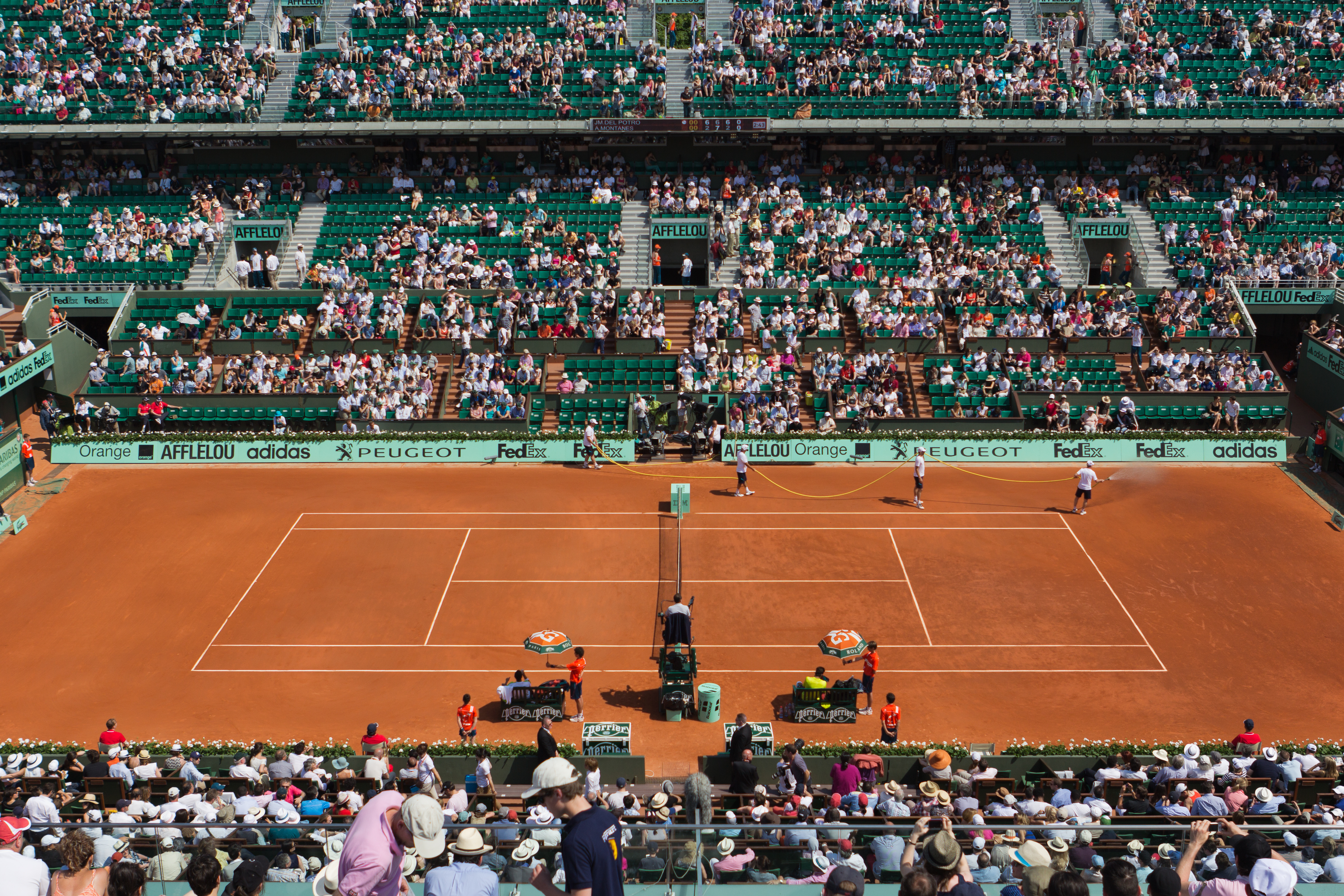 Vue de l'intérieur du Court Philippe Chatrier depuis la tribune J. Borotra - Stade de Roland Garros - 27 mai 2012, Paris, France